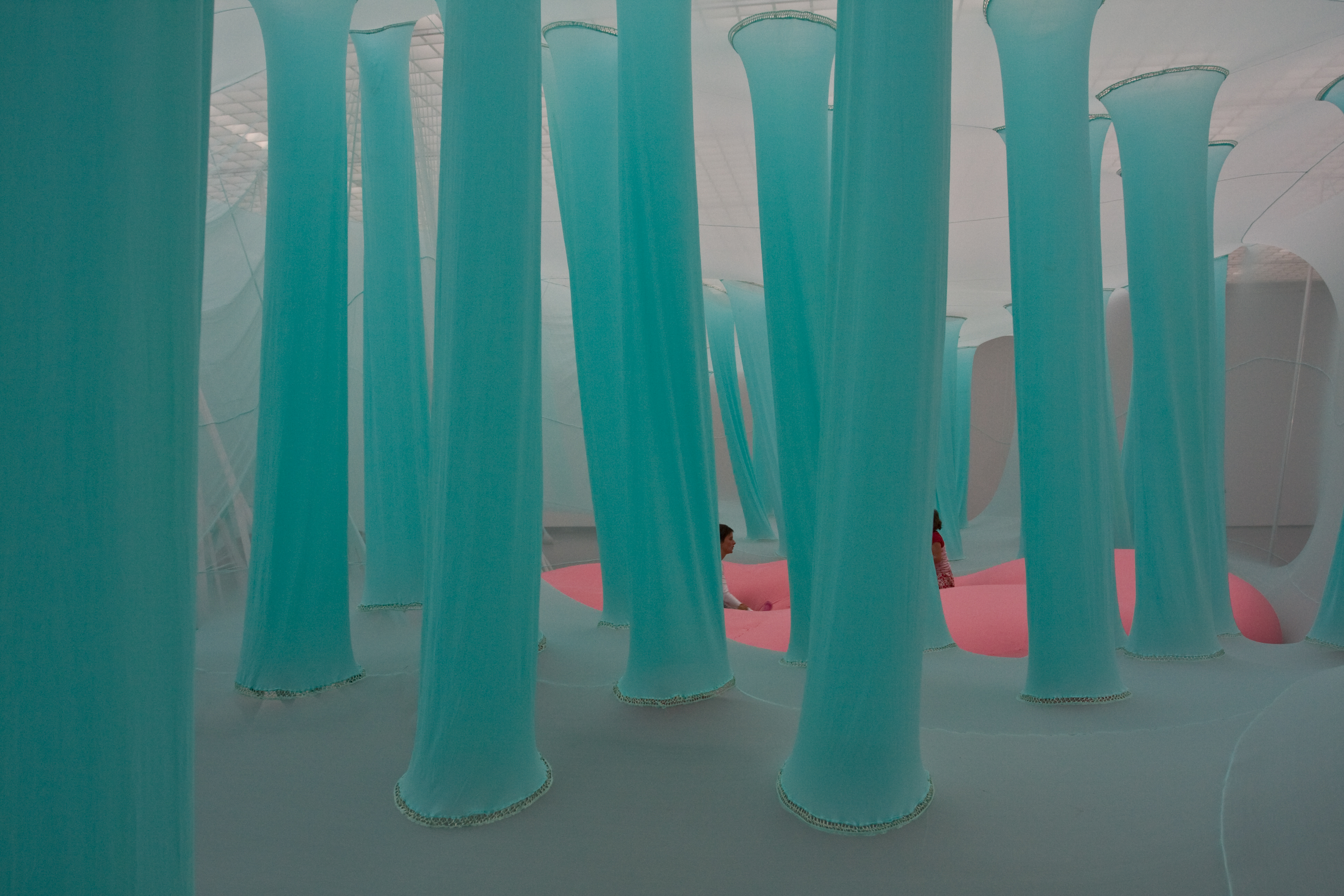 Boijmans van Beuningen - Celula Nave (Ernesto Neto)